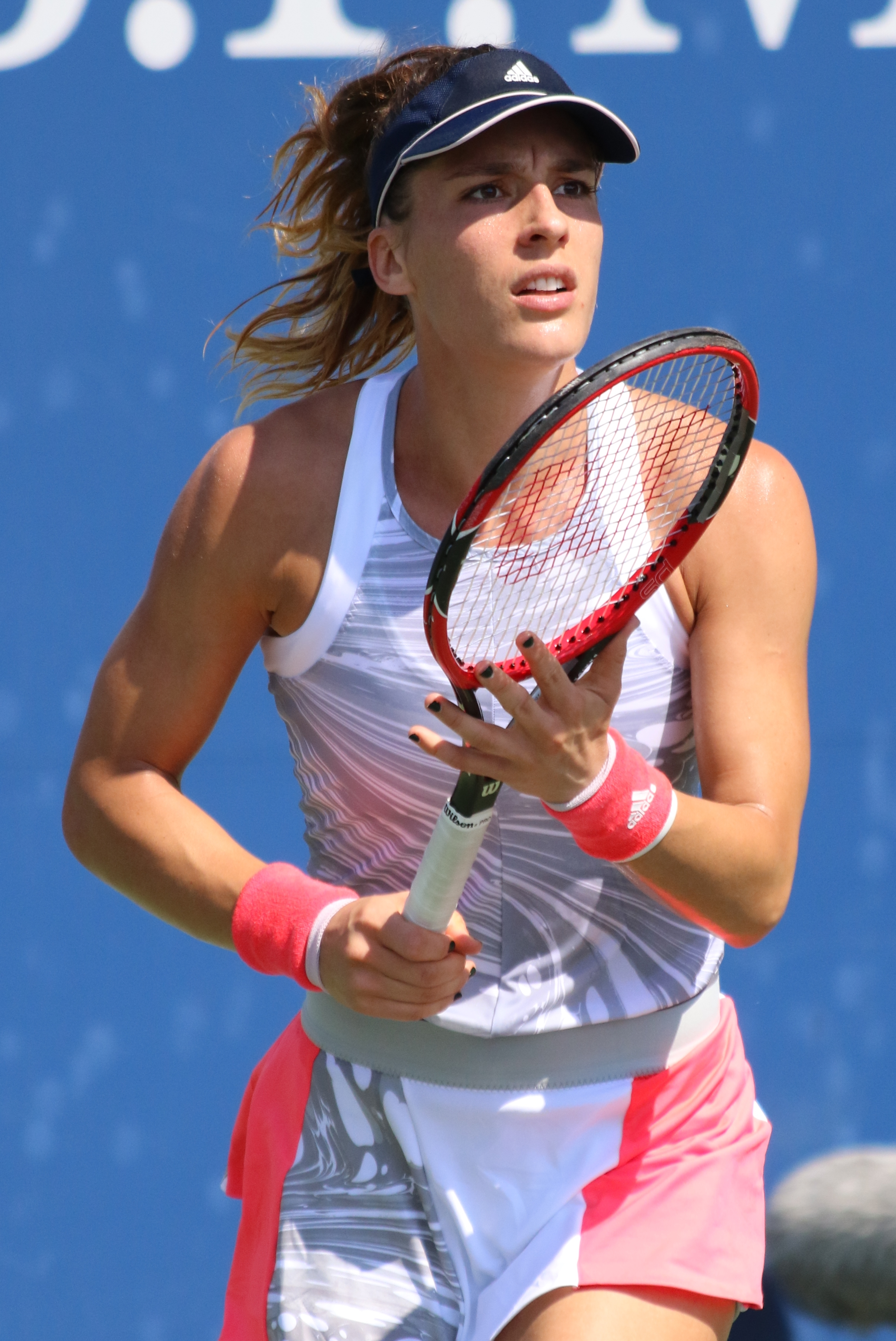 Petkovic US16 (20)